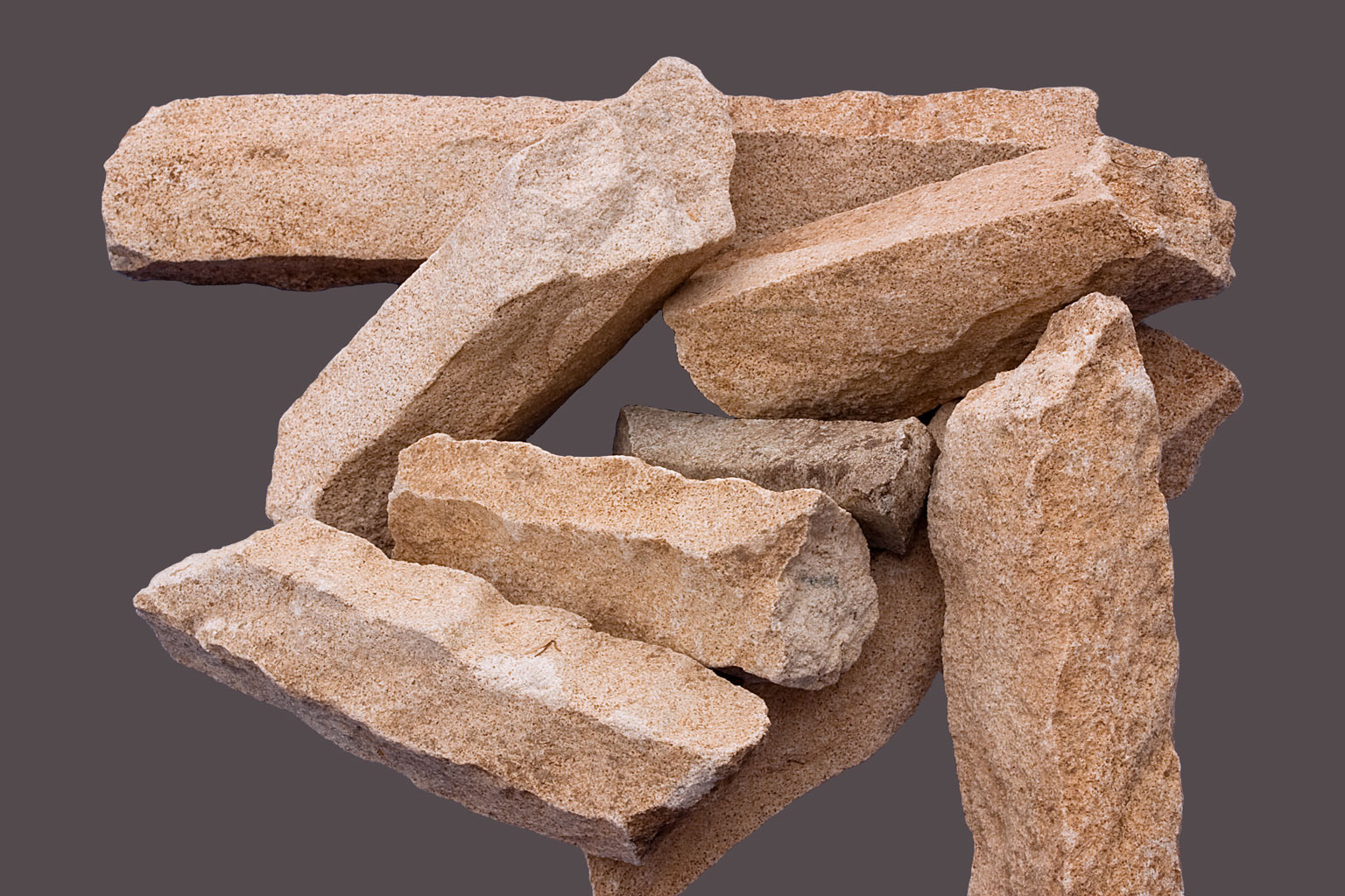 Säulen-Buntsandstein vom Wilden Stein in Büdingen, Hessen, Deutschland. Länge zwischen 5 und 15 cm.